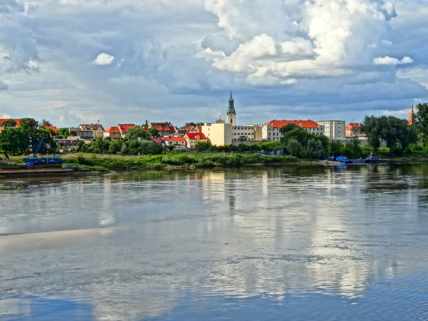 Widok Starego Fordonu (dzielnicy Bydgoszczy) od strony Wisły